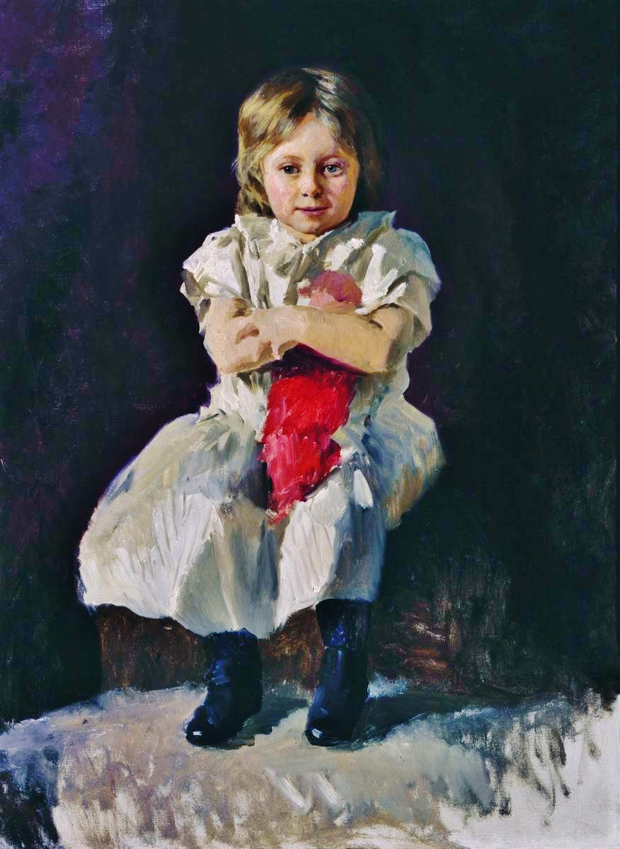 «Bambina con la bambola». La bimba ritratta è Nadja Volžinskaja, figlia adottiva di Jarošenko